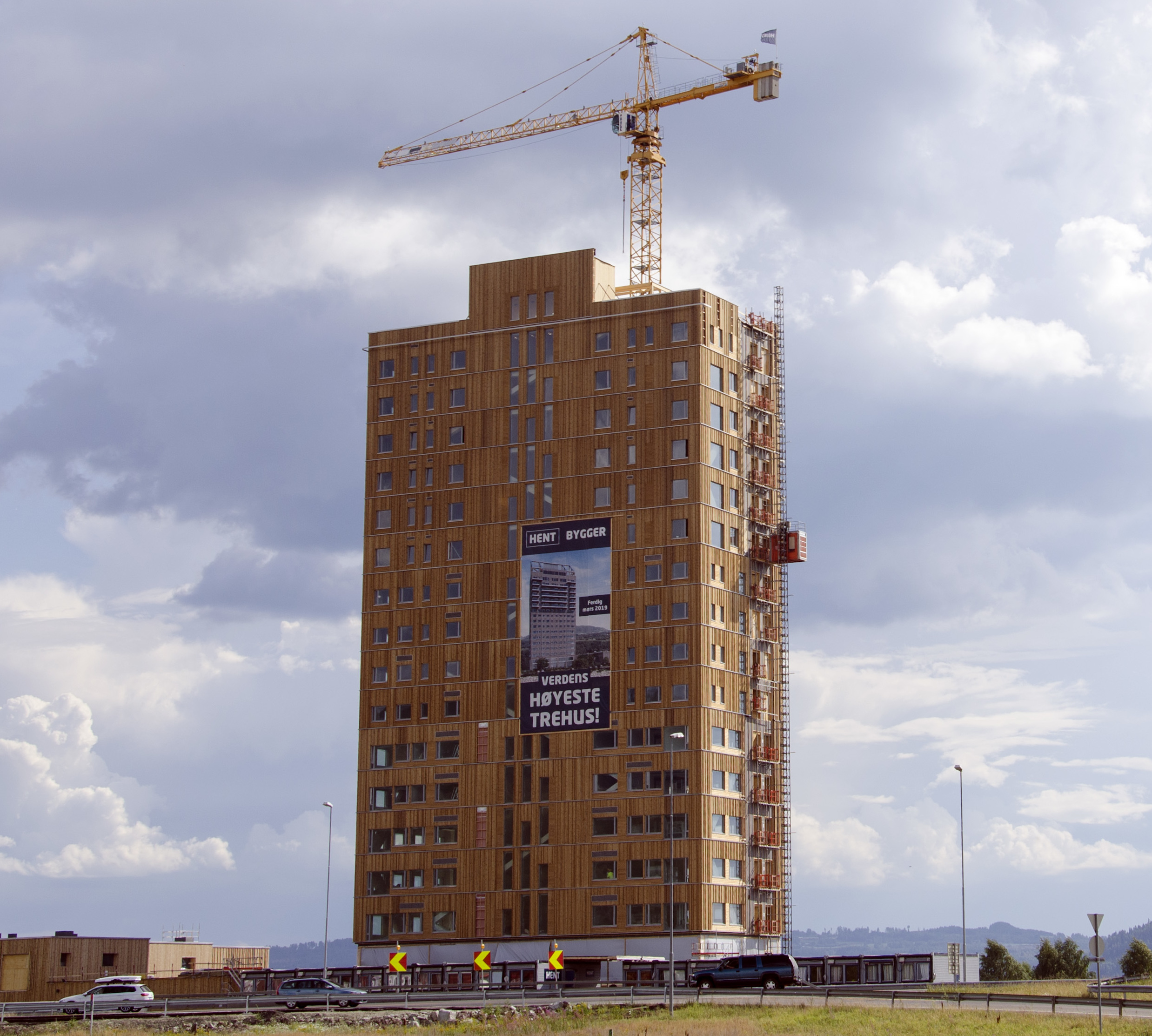 Mjøstårnet - Verdens høyeste trehus